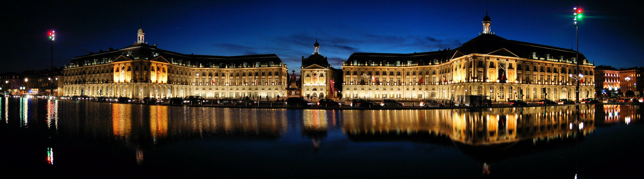 La Place de la Bourse (Bordeaux, France)